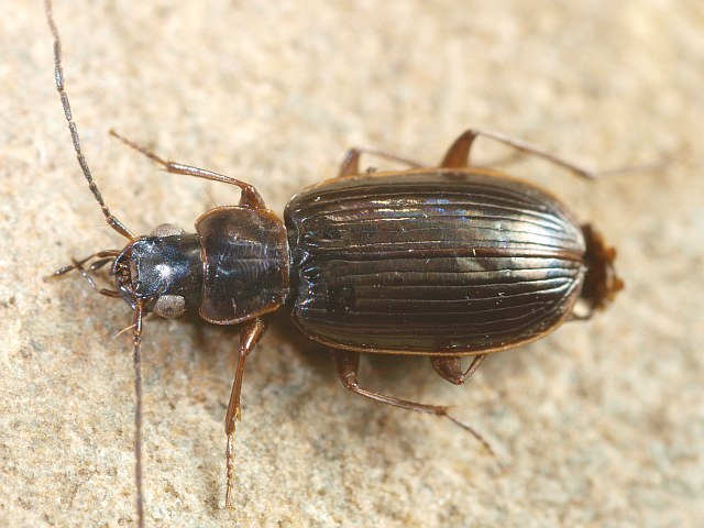 Badister peltatus, location: The Netherlands - Gameren - Lieskampen en Achterbroek